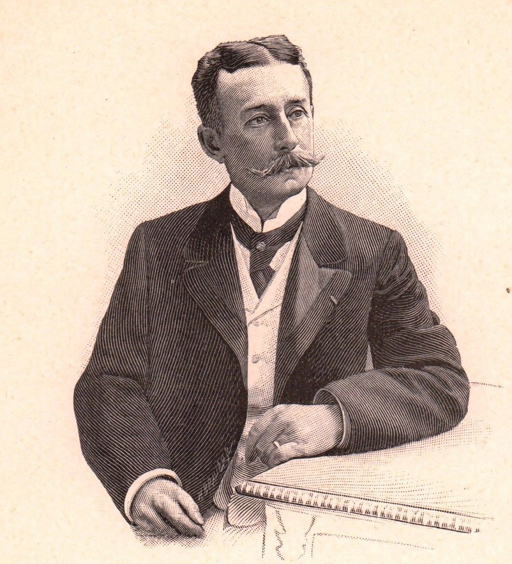 French writer René Bazin (1853-1932)